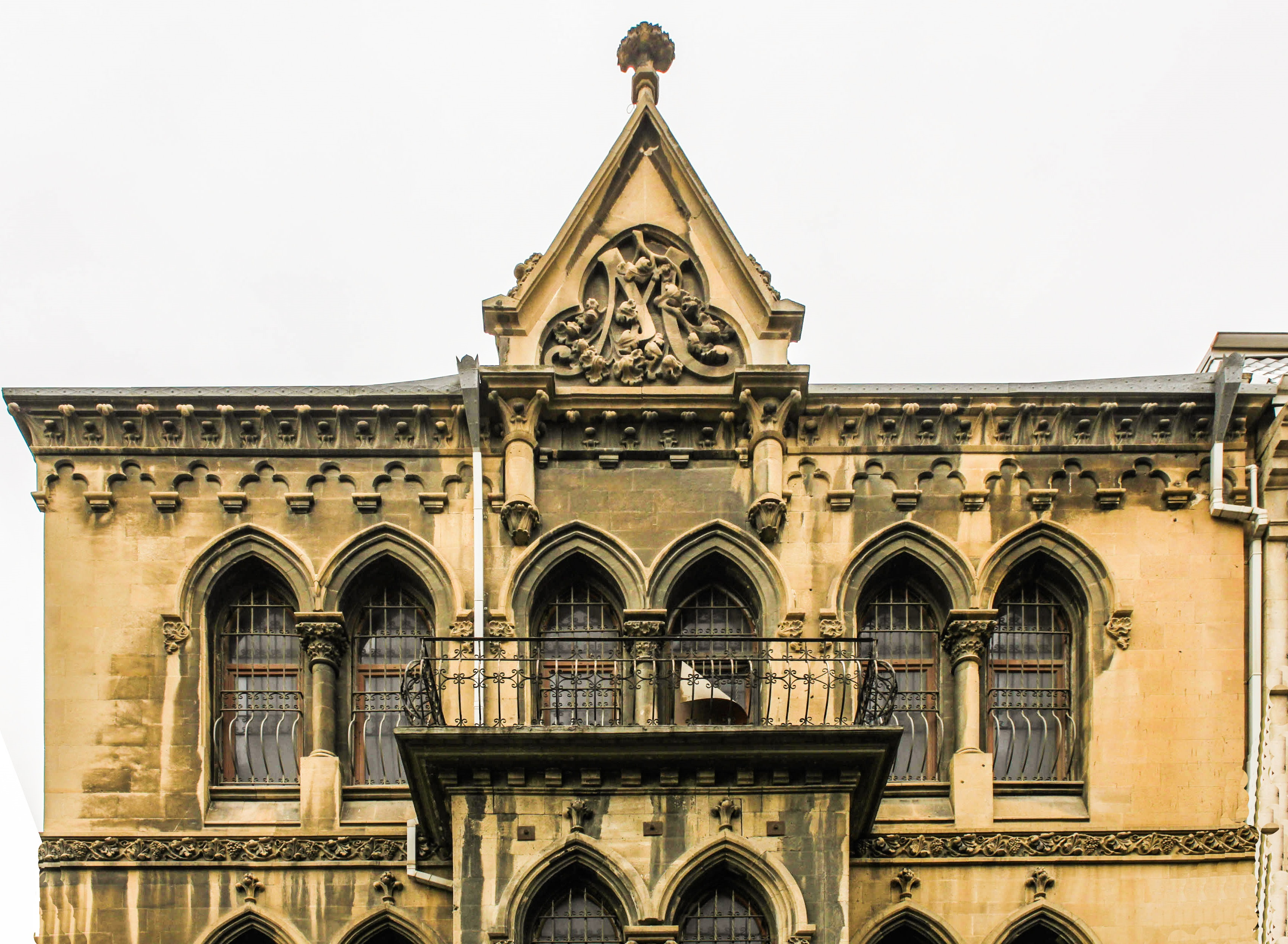 Yaşayış binası, İslam Səfərli küç. 19